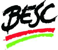 Antigo logotipo do Banco do Estado de Santa Catarina, usado até 1999.